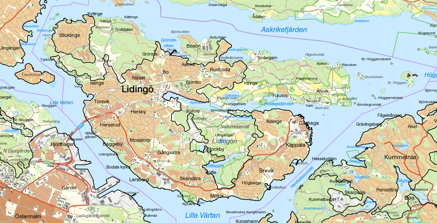 Tätorten Lidingö med gränserna från Statistiska centralbyråns tätortsavgränsning 2015 i svart. Bakgrundskarta från Lantmäteriet, skala 1:30 236.